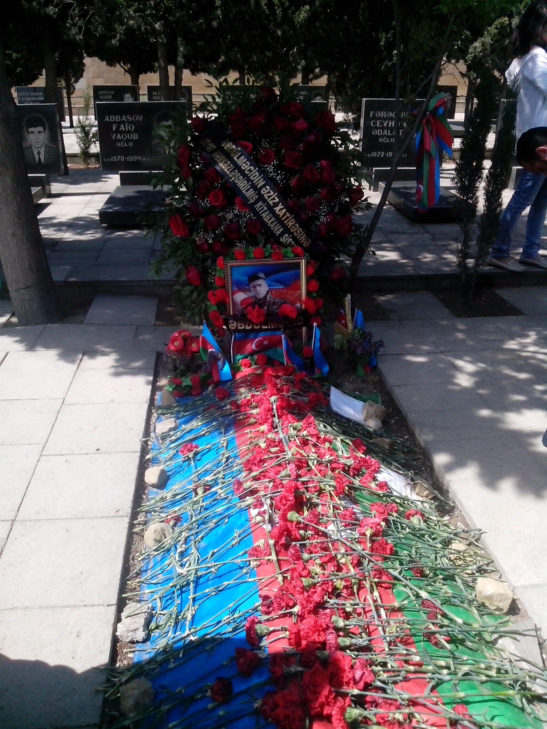 Sumqayıt Şəhidlər Xiyabanında dəfn olunan şəhid